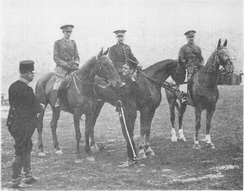 Membres de l'équipe espagnole de saut d'obstacles aux jeux olympiques d'Amsterdam en 1928.